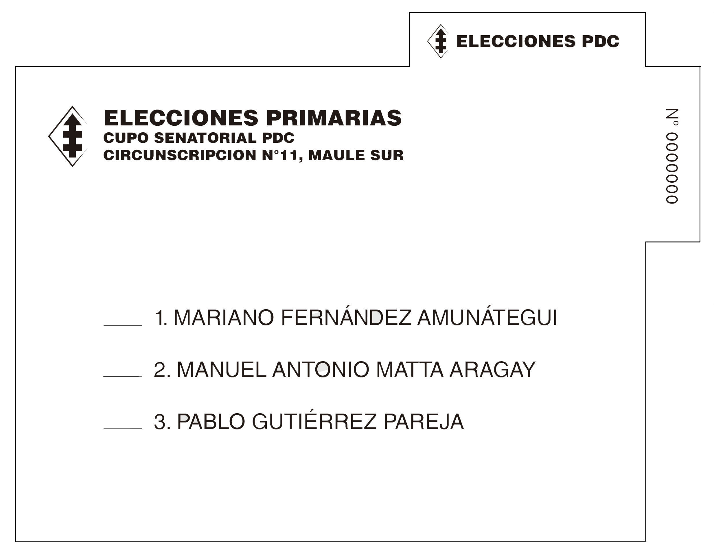 Reproducción de la cédula de votación utilizada en la elección complementaria organizada por el Partido Demócrata Cristiano de Chile en abril de 2014 para definir al reemplazante de Ximena Rincón en el Senado.